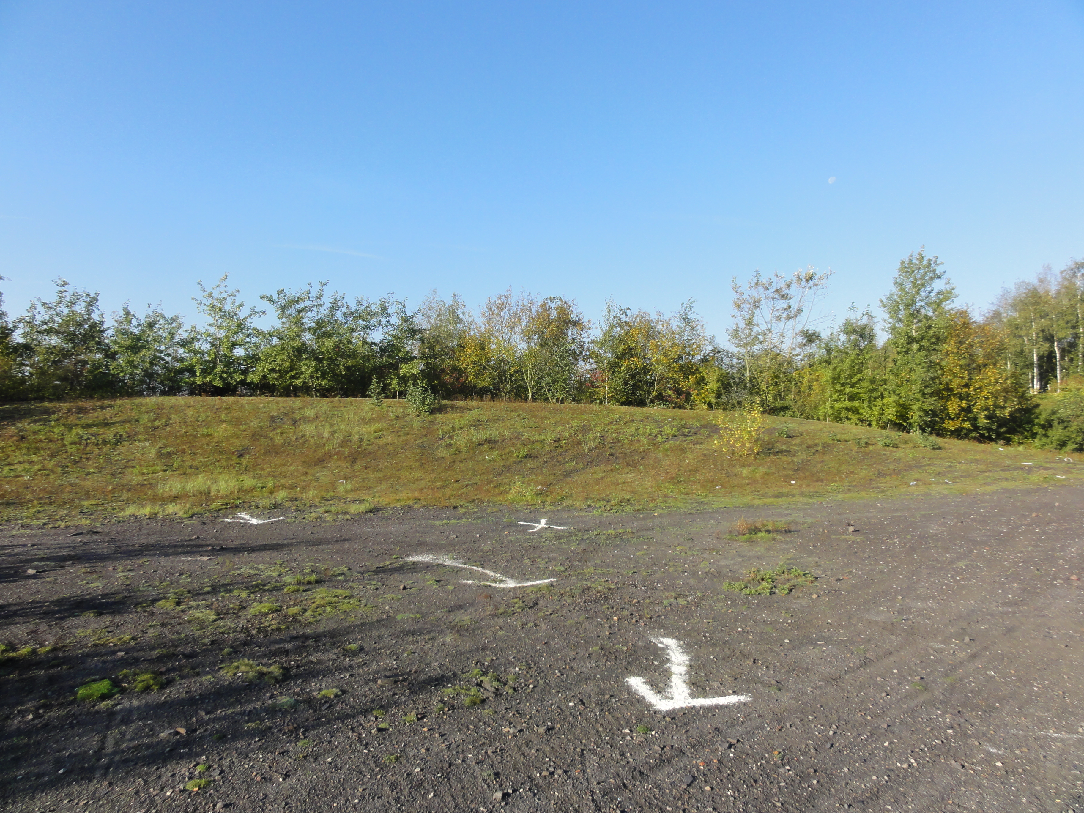 Terril n° 120 dit 6 d'Oignies Nord, Fosse n° 6 de la Compagnie des mines d'Ostricourt, Ostricourt, Nord, Nord-Pas-de-Calais, France.